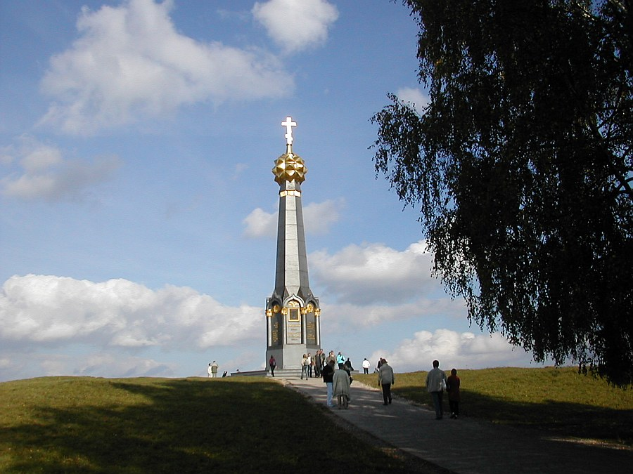 Pomnik bitwy pod Borodino 1812 r. (zdjęcie z września 2004 r.)